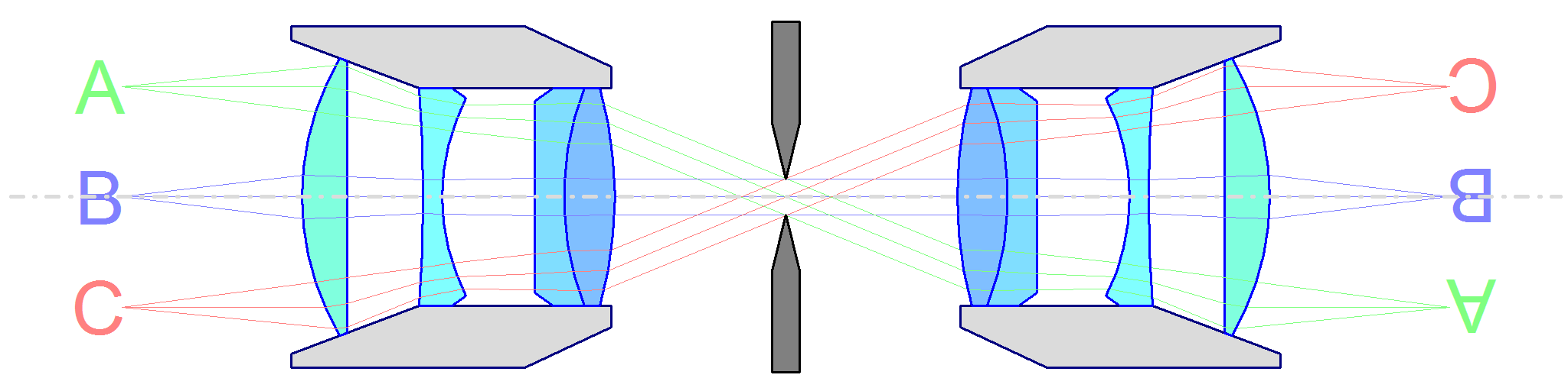 Telezentrische Abbildung beidseitig